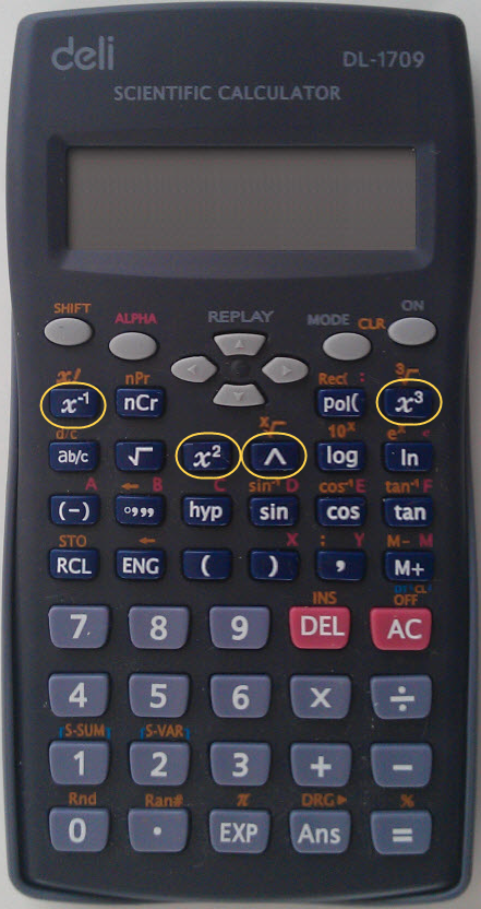 Научен дигитрон со означени дирки за експоненти